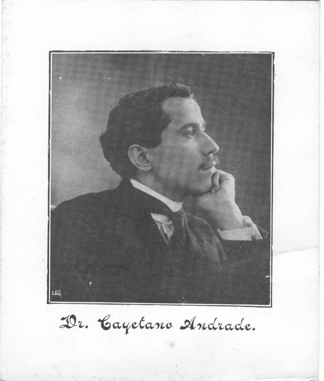 Dr. Cayetano Andrade López